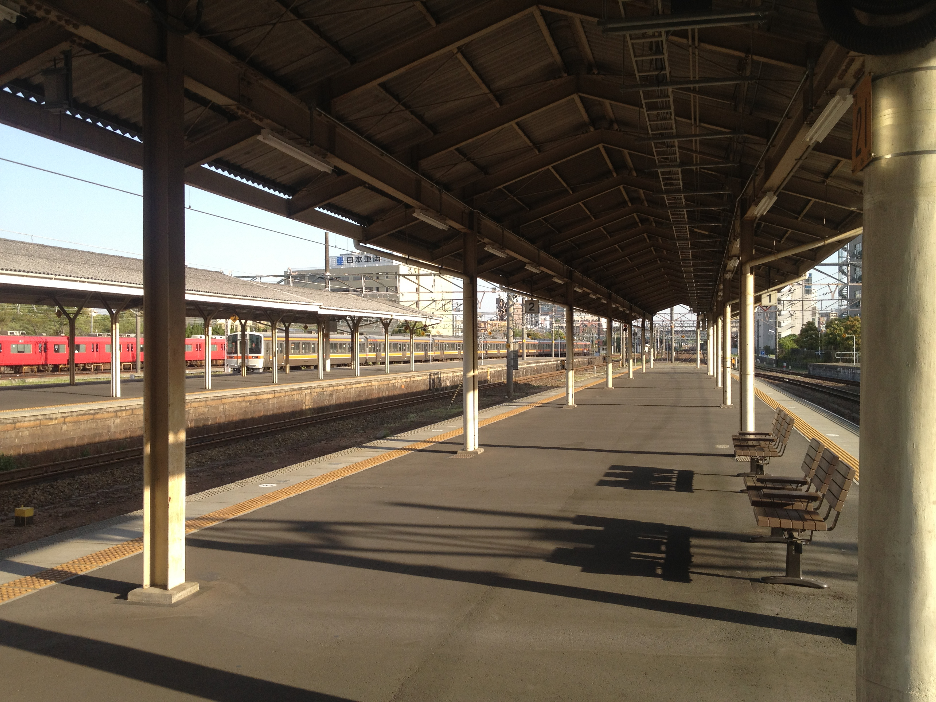 JR東海熱田駅プラットフォーム